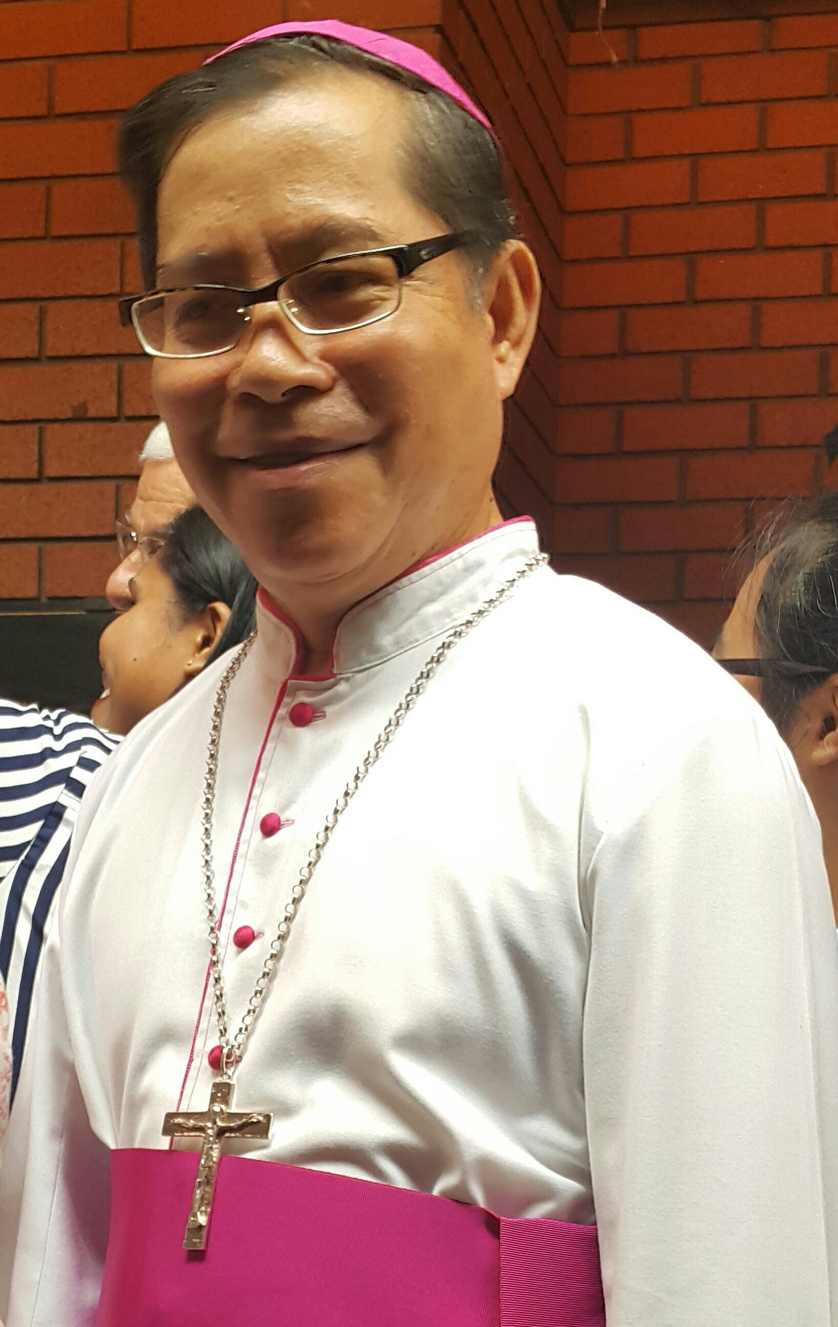 Mgr Benedictus Estephanus Rolly Untu, Uskup Manado